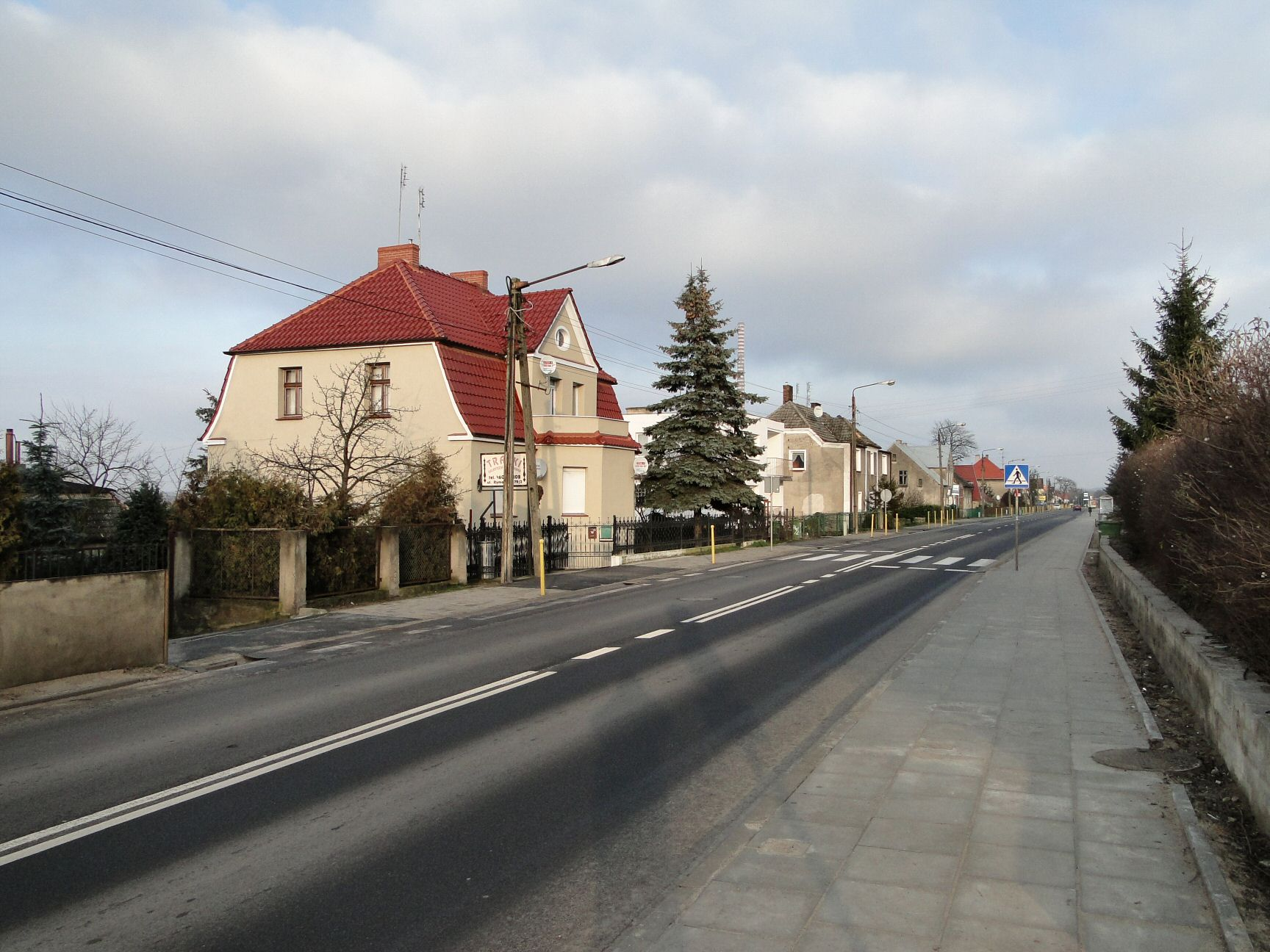 Ul. Rymarskia w Szczecinie Kluczu